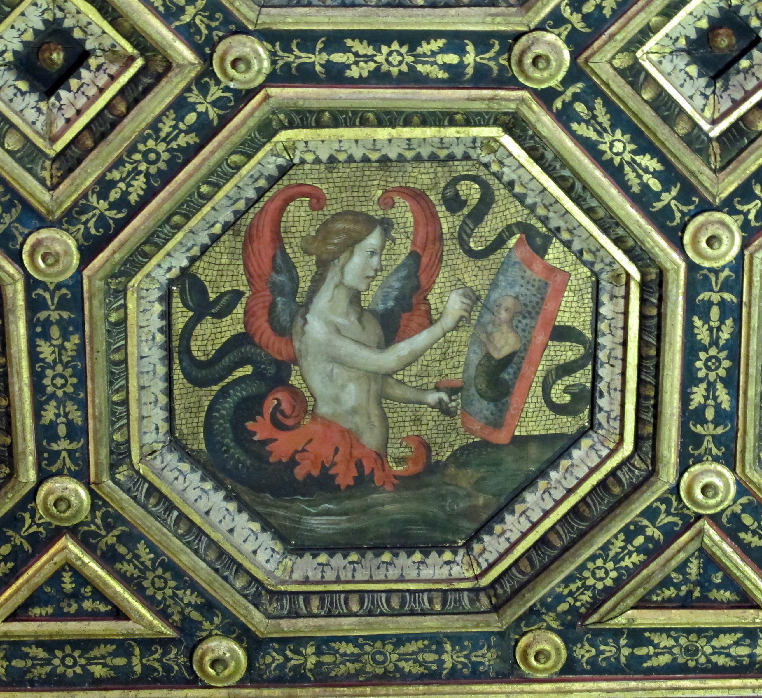 Soffitto dei Semidei, Pinturicchio